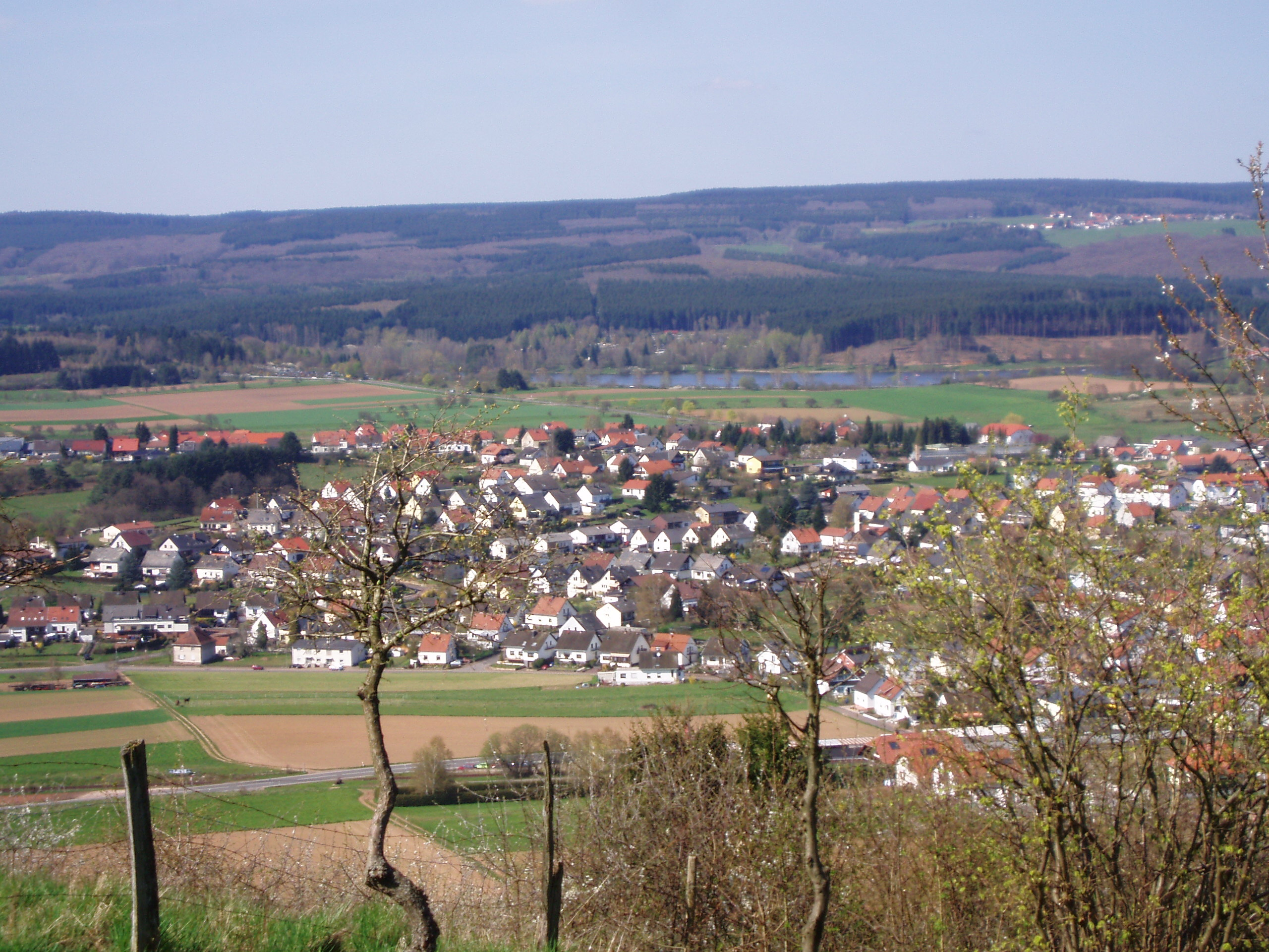 Blick vom Parkplatz der Donatuskapelle auf Losheim und den Stausee Losheim